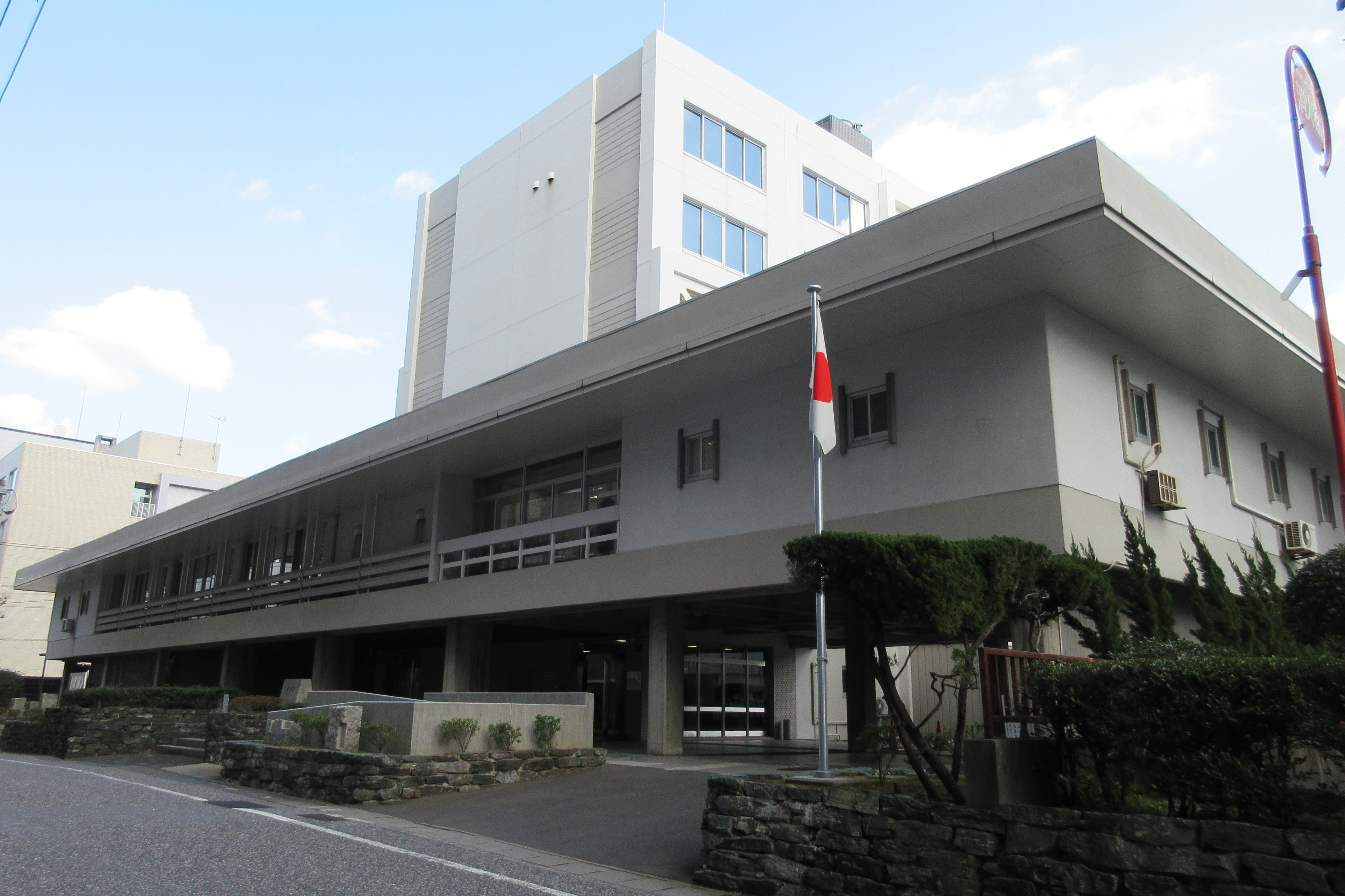 長崎地方検察庁